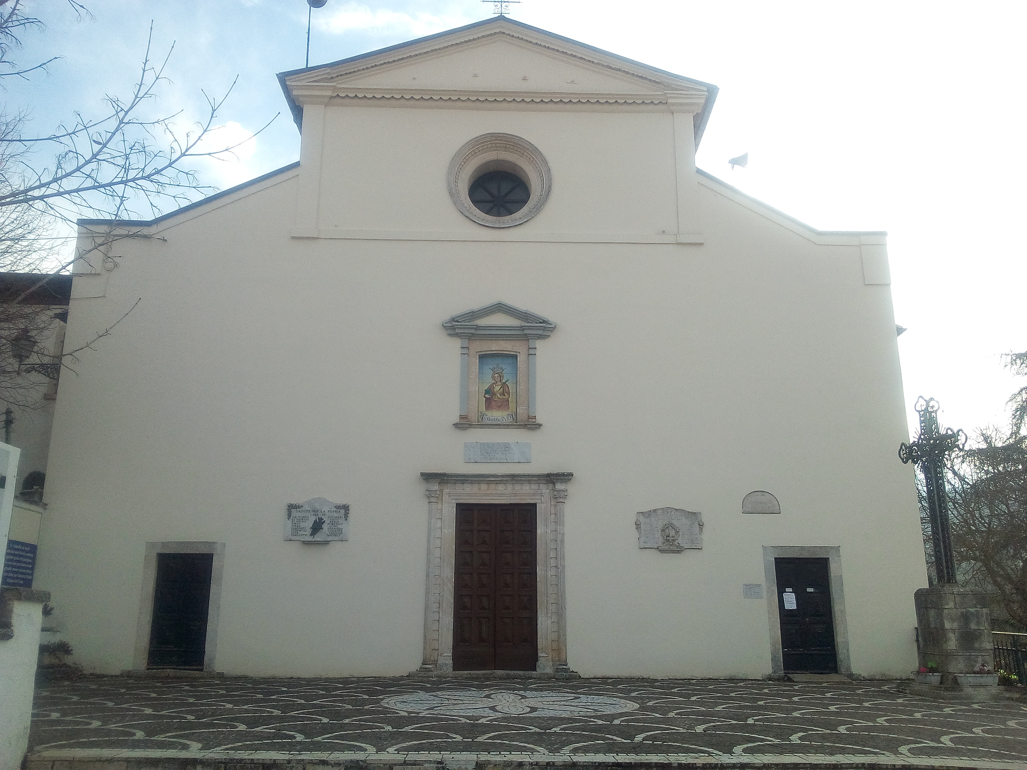 Santuario di Santa Anatolia a Santa Anatolia di Borgorose